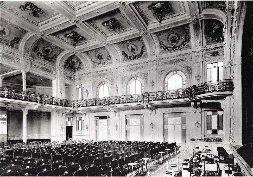 Il Kursaal Diana in Milano - salone teatro - vista dall'interno (1909), da L'Architettura Moderna.